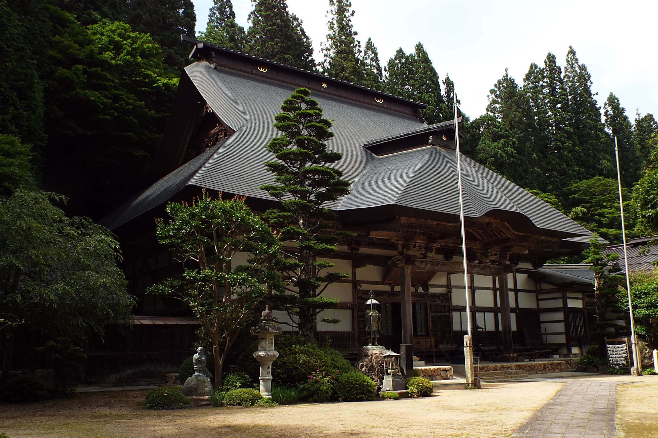 満願寺（まんがんじ）山号:栗尾山。 長野県安曇野市にある真言宗豊山派の寺院。